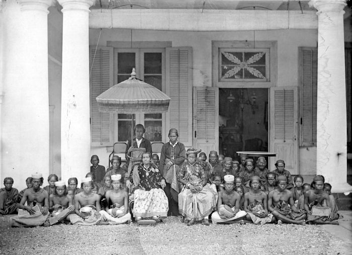 Negatief. Portret van de vorstin van Tanette, Zuid-Sulawesi, met gevolg